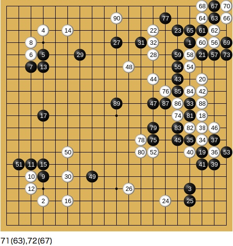 第16期本因坊戦第1局 坂田栄男 中押勝 高川格